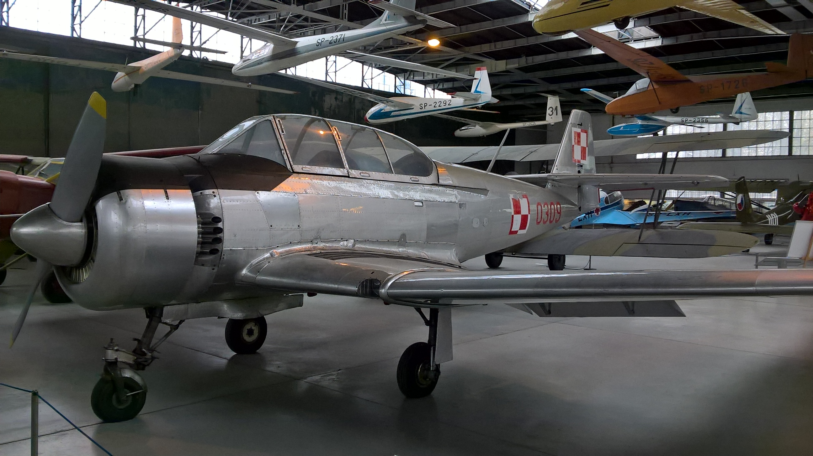 Polski samolot szkolno-treningowy TS-8 Bies z 1958 r. eksponowany w Muzeum Lotnictwa Polskiego w Krakowie.